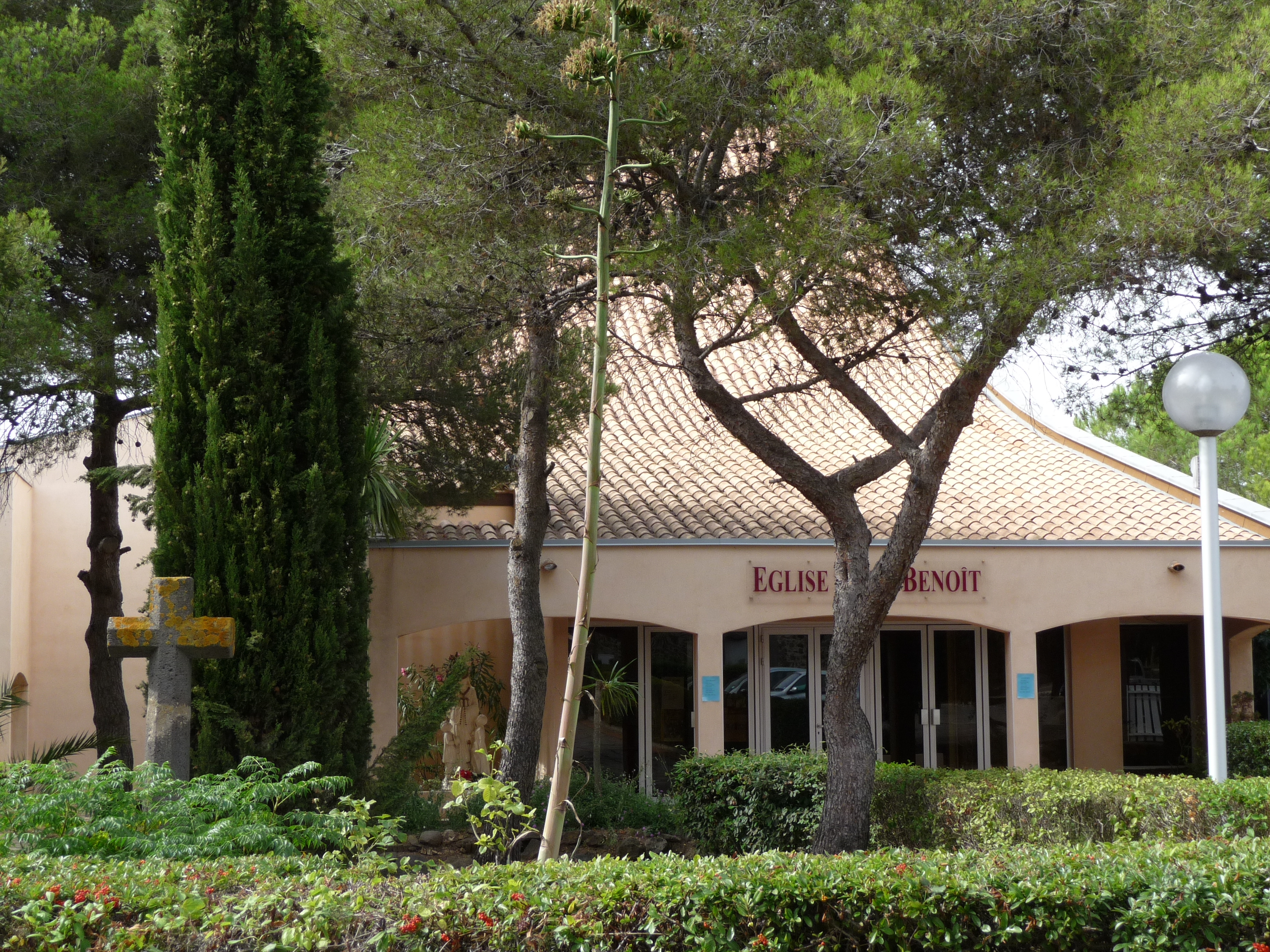 église Saint-Benoît au Cap d'Agde (Hérault, France)